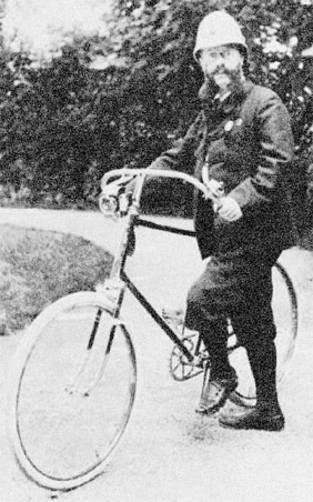 Emil Jellinek - Libre de droit from [1]